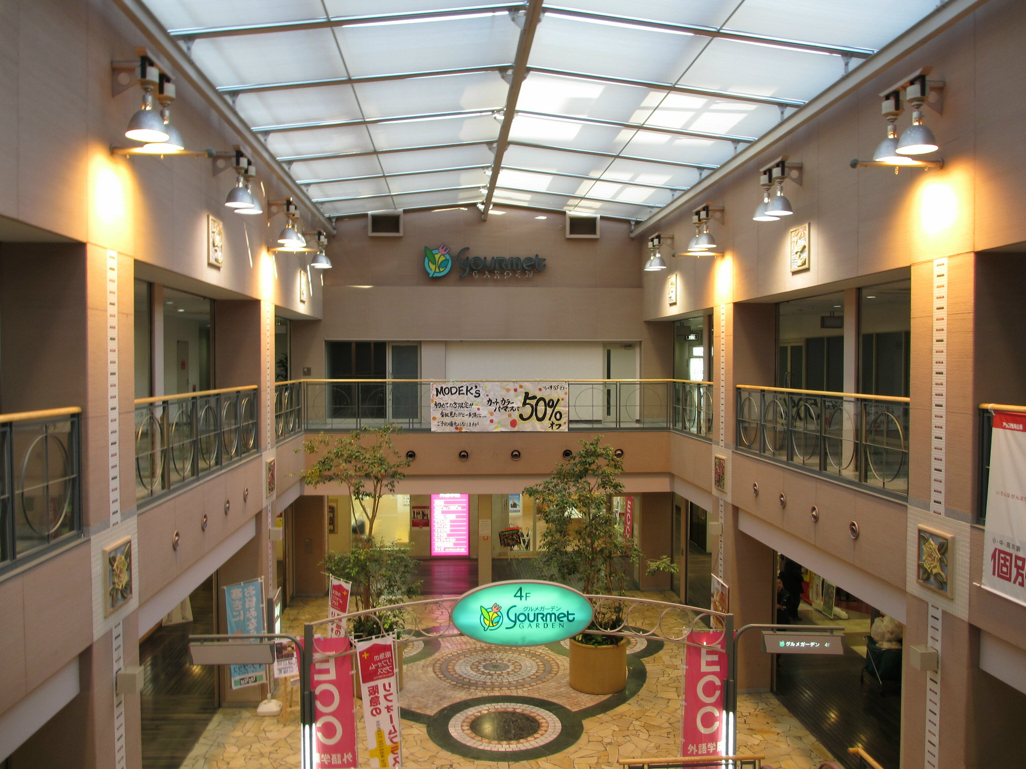 Hankyu Itami Station